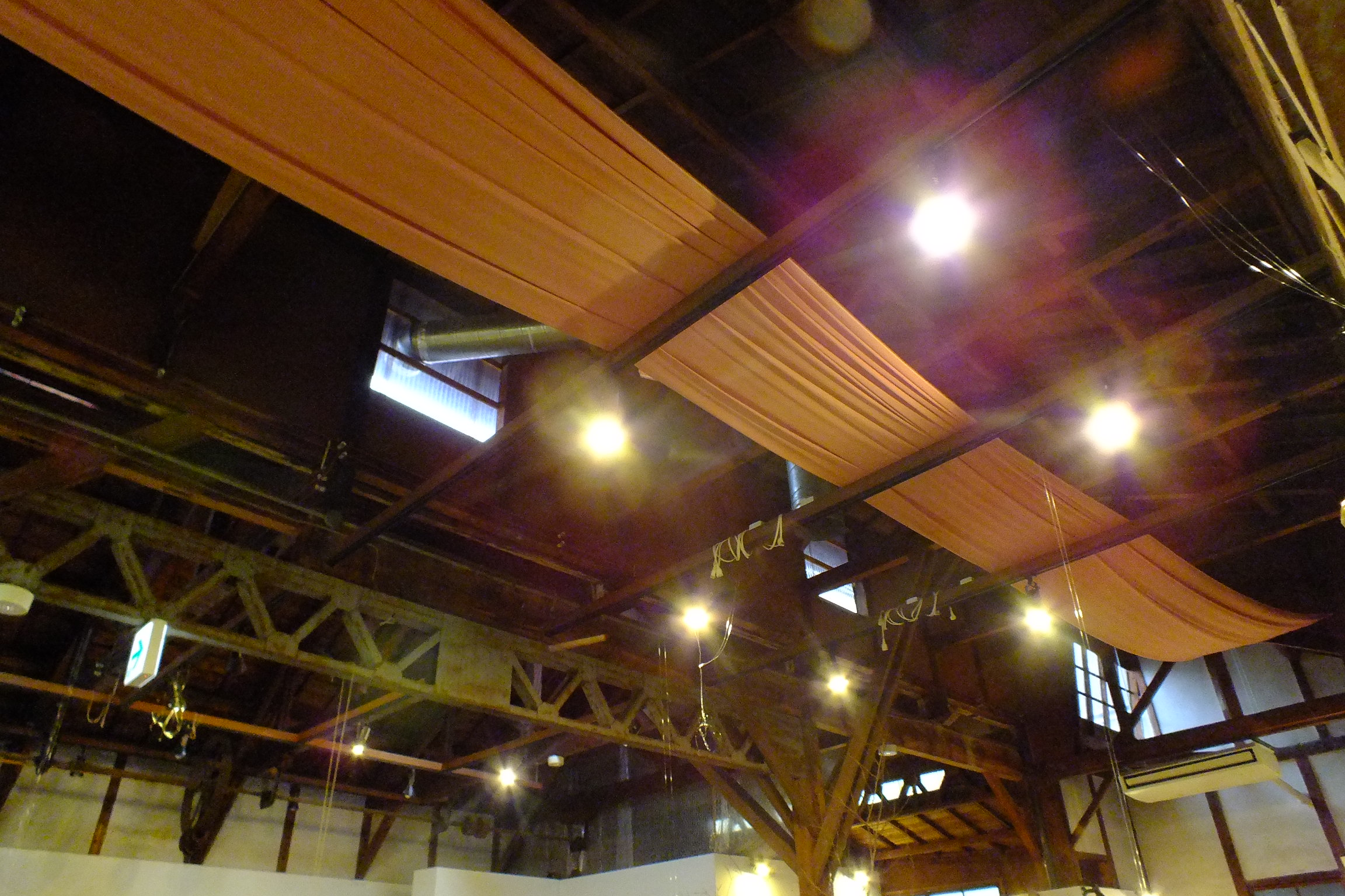 Banshu-ori kobokan 播州織工房館